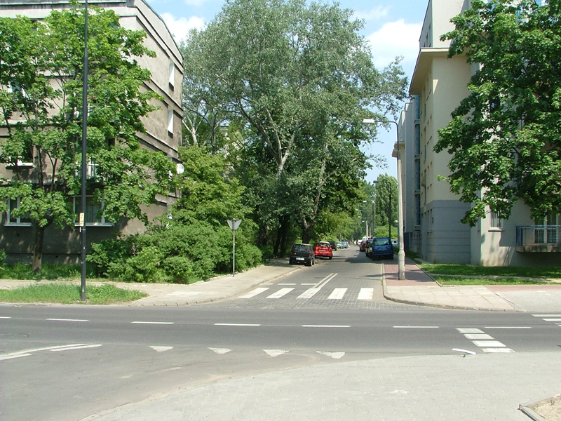 pl, Warsaw, Poland, Praga Południe, Grochów, Nasielska Street in Warsaw